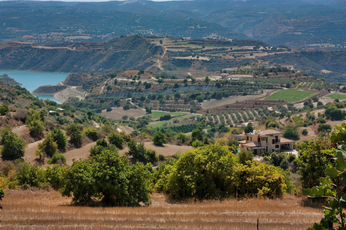 Cyprus IMG_9439